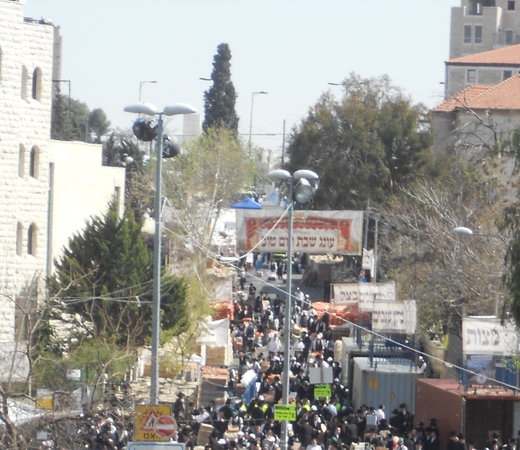 חלוקת מזון מסורתית בערב פסח